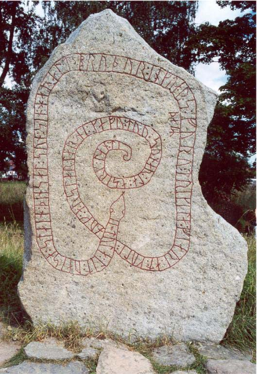 Image retouchée de File:SÖ179 Gripsholm Runestone.jpg suite demande sur Wikipédia:Atelier graphique/Images à améliorer#Pierre runique de Gripsholm A vocation, si la retouche convient, à être basculée sur Commons. TCY 3 décembre 2007 à 04:18 (CET) This image was improved or created by the Wikigraphists of the Graphic Lab (fr). You can propose images to clean up, improve, create or translate as well.